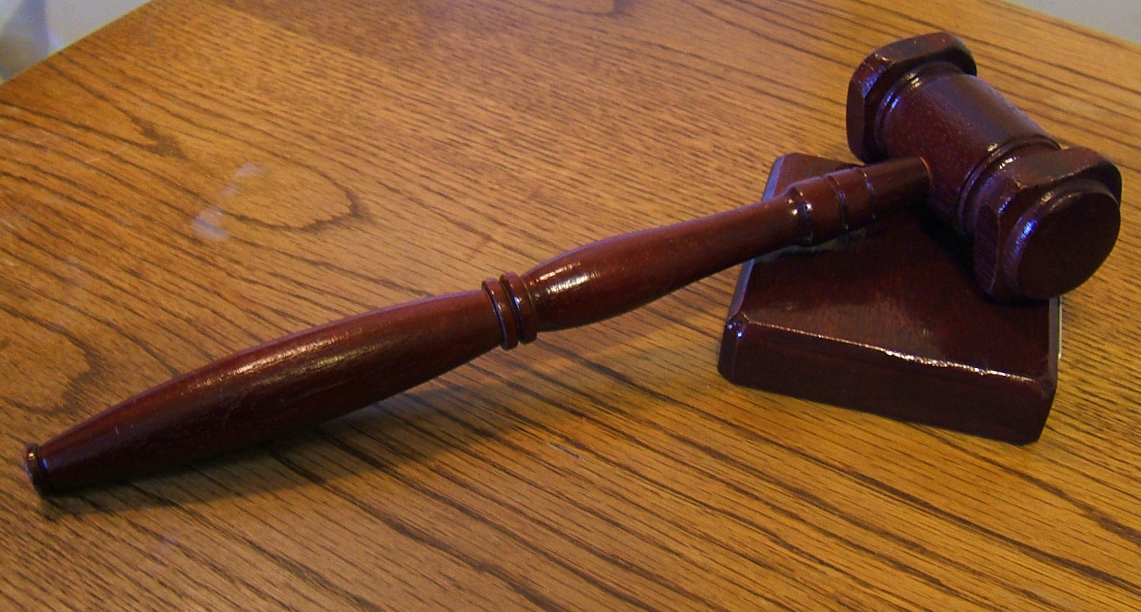 De voorzittershamer.